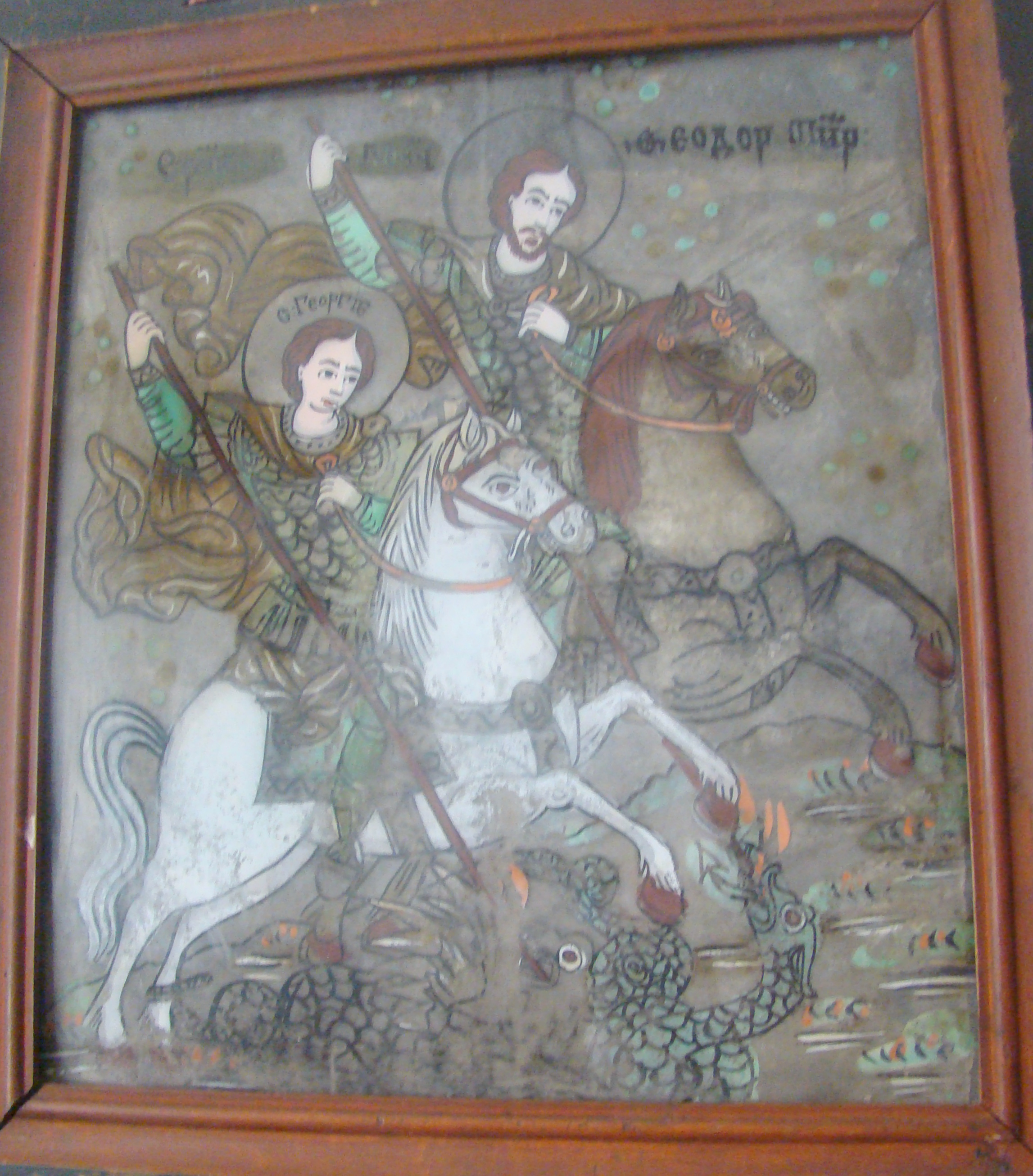 Muzeul de icoane pe sticlă „Pr.Zosim Oancea” din Sibiel